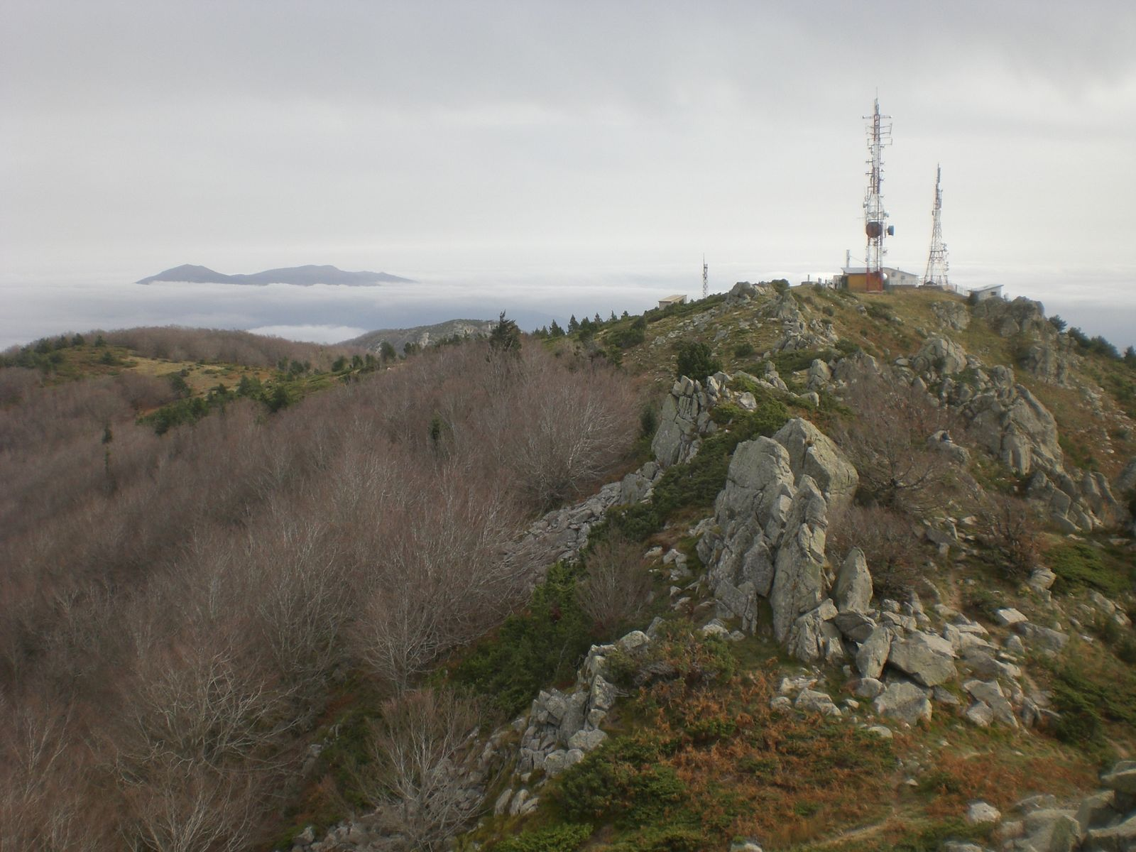 Vista de El Moixer des de el Roc de Frausa